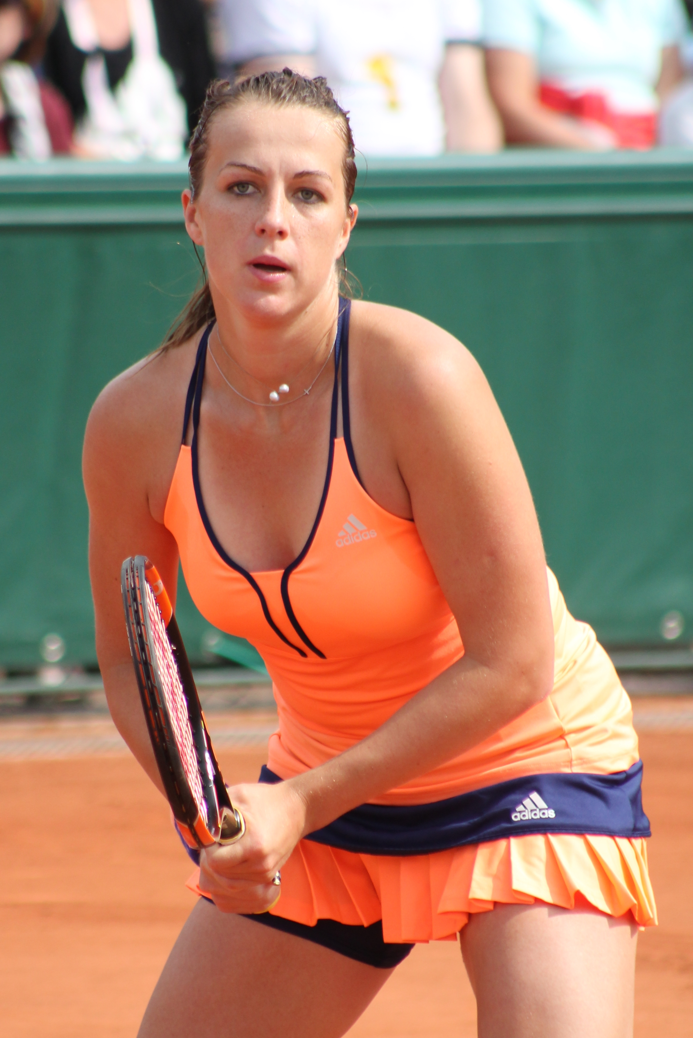 Pavlyuchenkova RG15 (12)